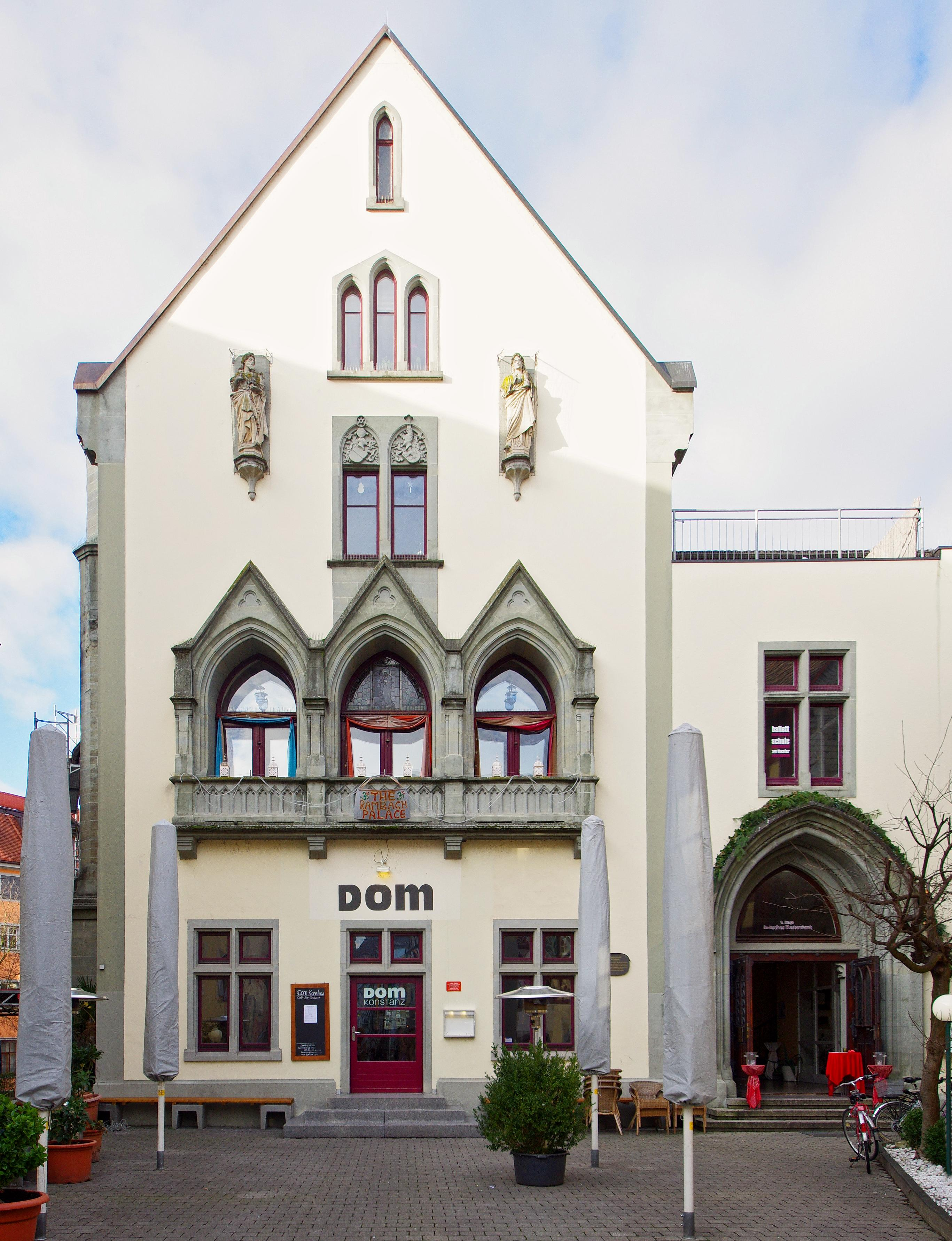 Gebäude in Konstanz